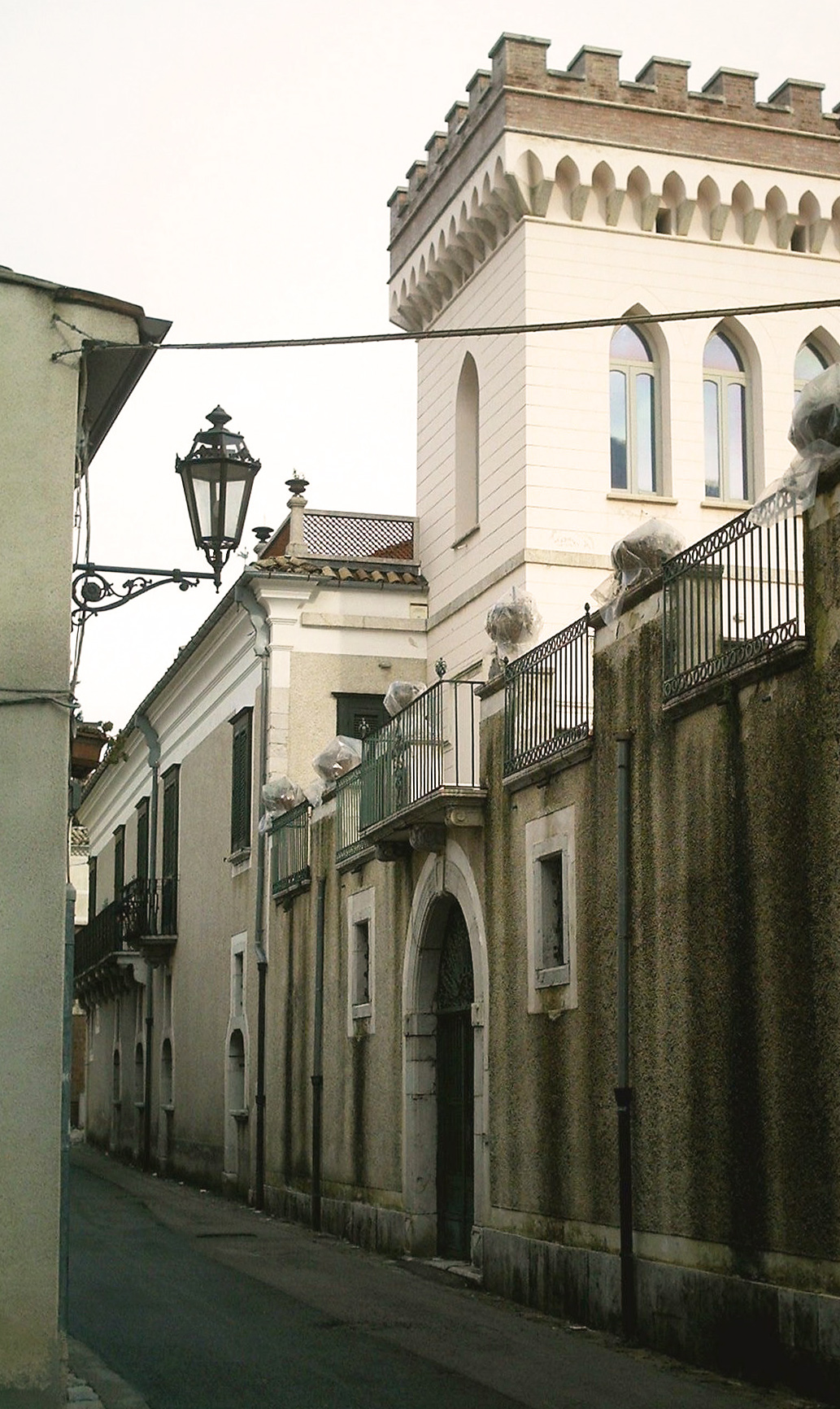 Villa Bruni a Montella (sono l'autore della foto, l'ho scattata con queste mani nell'anno del Signore 2008 da Via Capone a Montella)